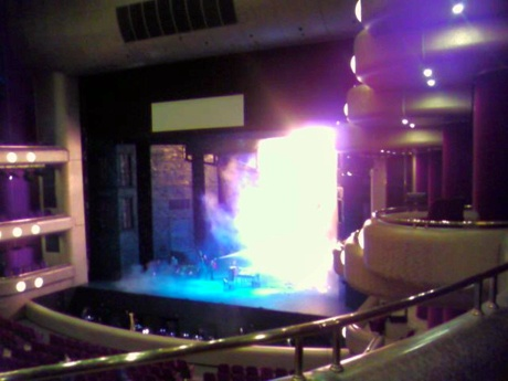 예술의 전당 오페라 하우스. 라보엠 공연 도중 화재 장면.